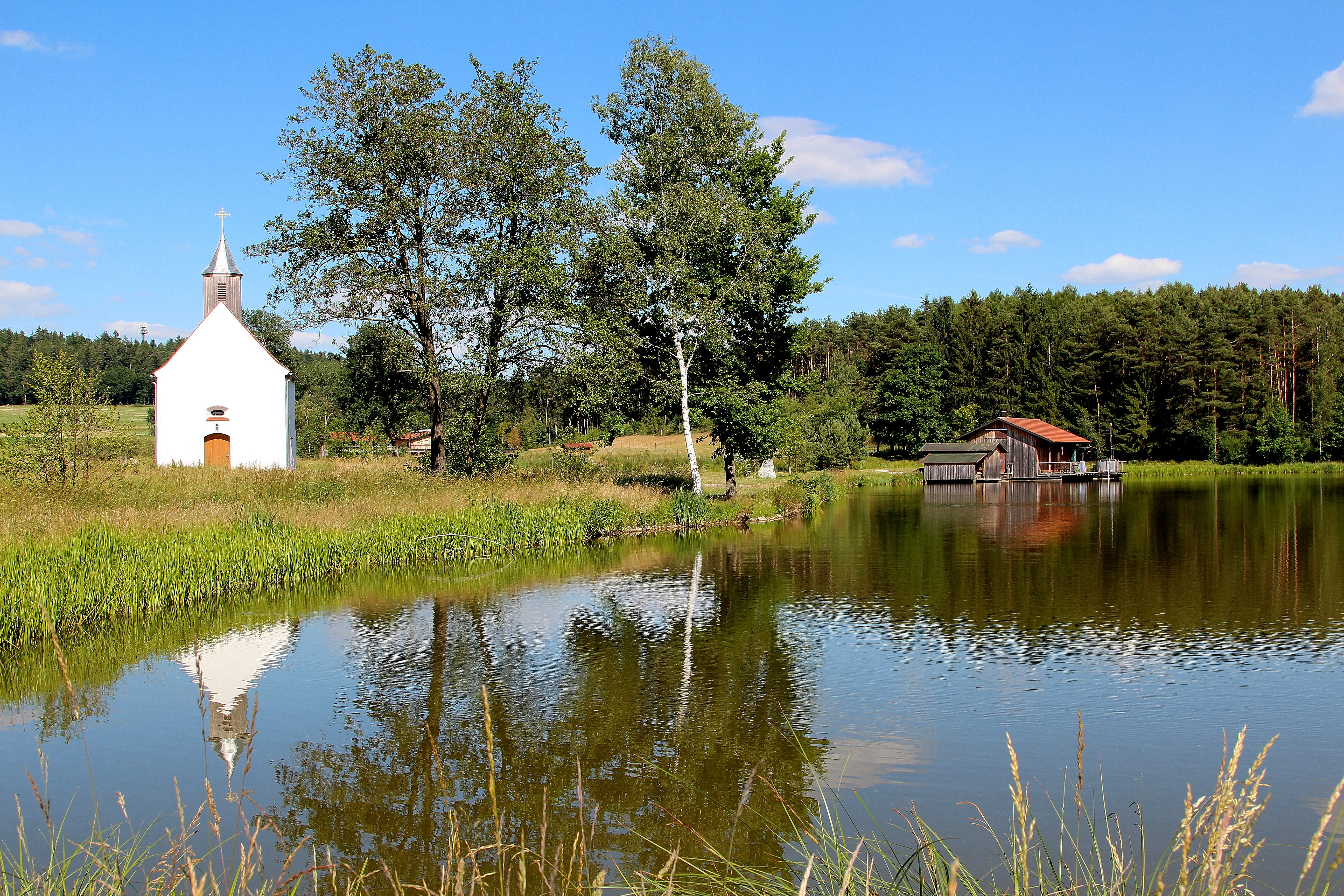 Katholische Wallfahrtskirche St. Koloman in Warmersdorf: verputzter Bruchsteinmauerwerksbau mit Satteldach und verbrettertem Dachreiter mit Pyramidendach, gotischer Rechteckchor mit Sterngewölbe, 15./16. Jahrhundert, Langhaus barock; mit Ausstattung; Warmersdorf, Gemeinde Bodenwöhr, Landkreis Schwandorf, Oberpfalz, Bayern